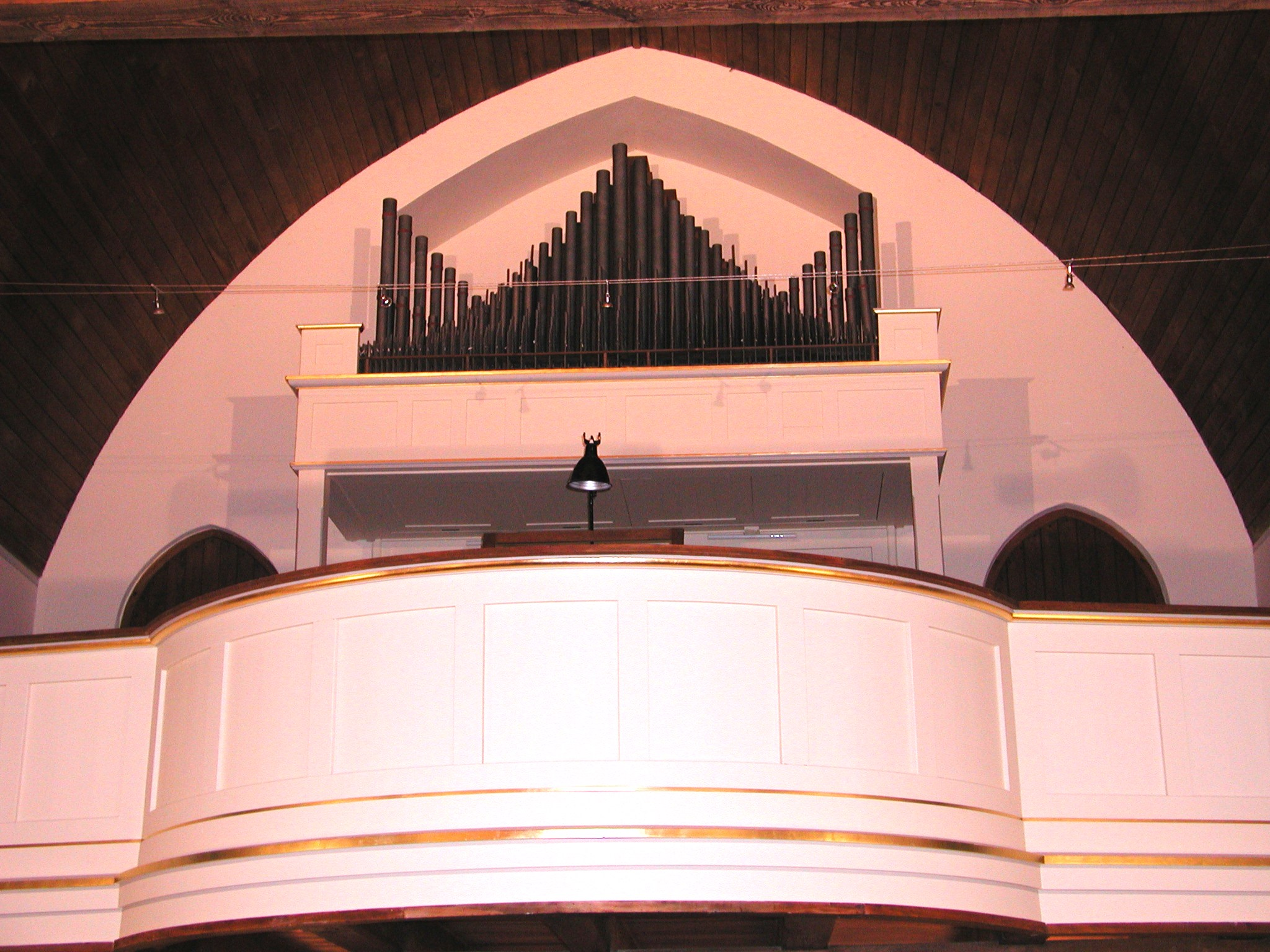 Dorfkirche Weißensee